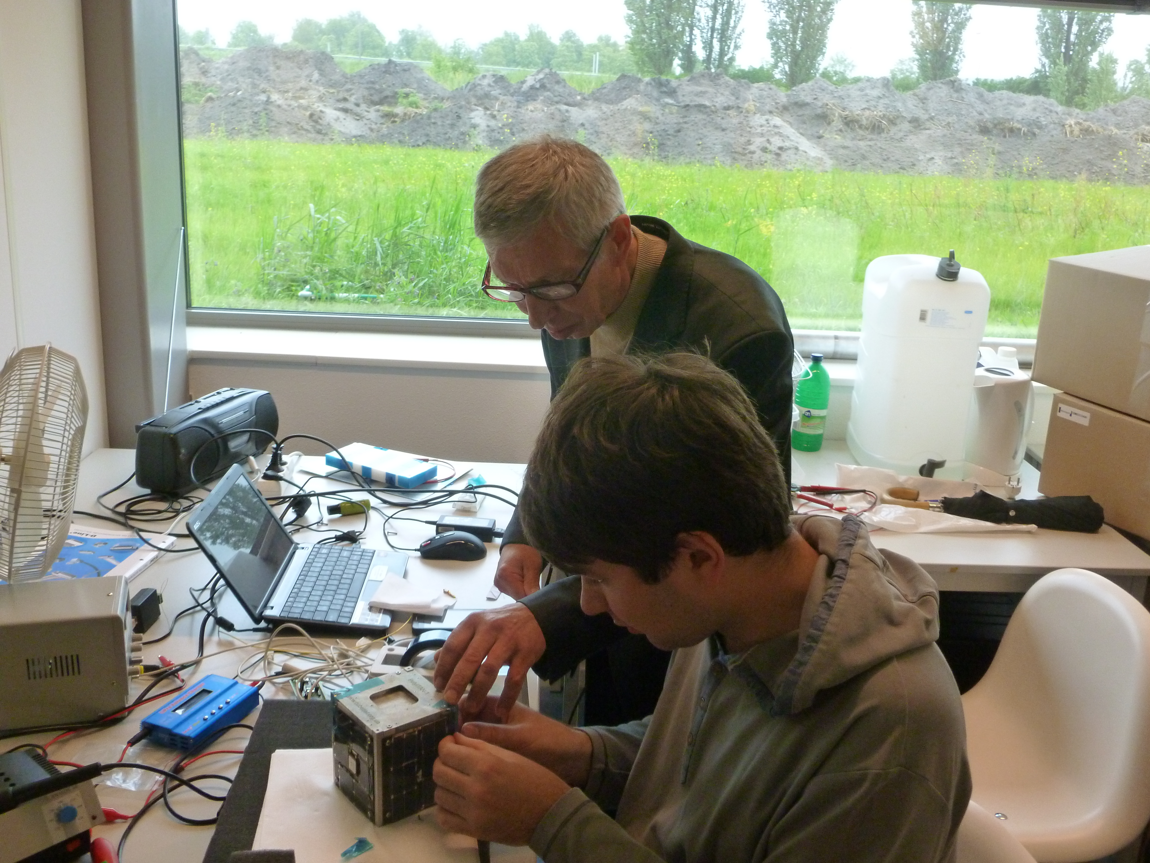 Фінальна наладка супутника PolyITAN-1